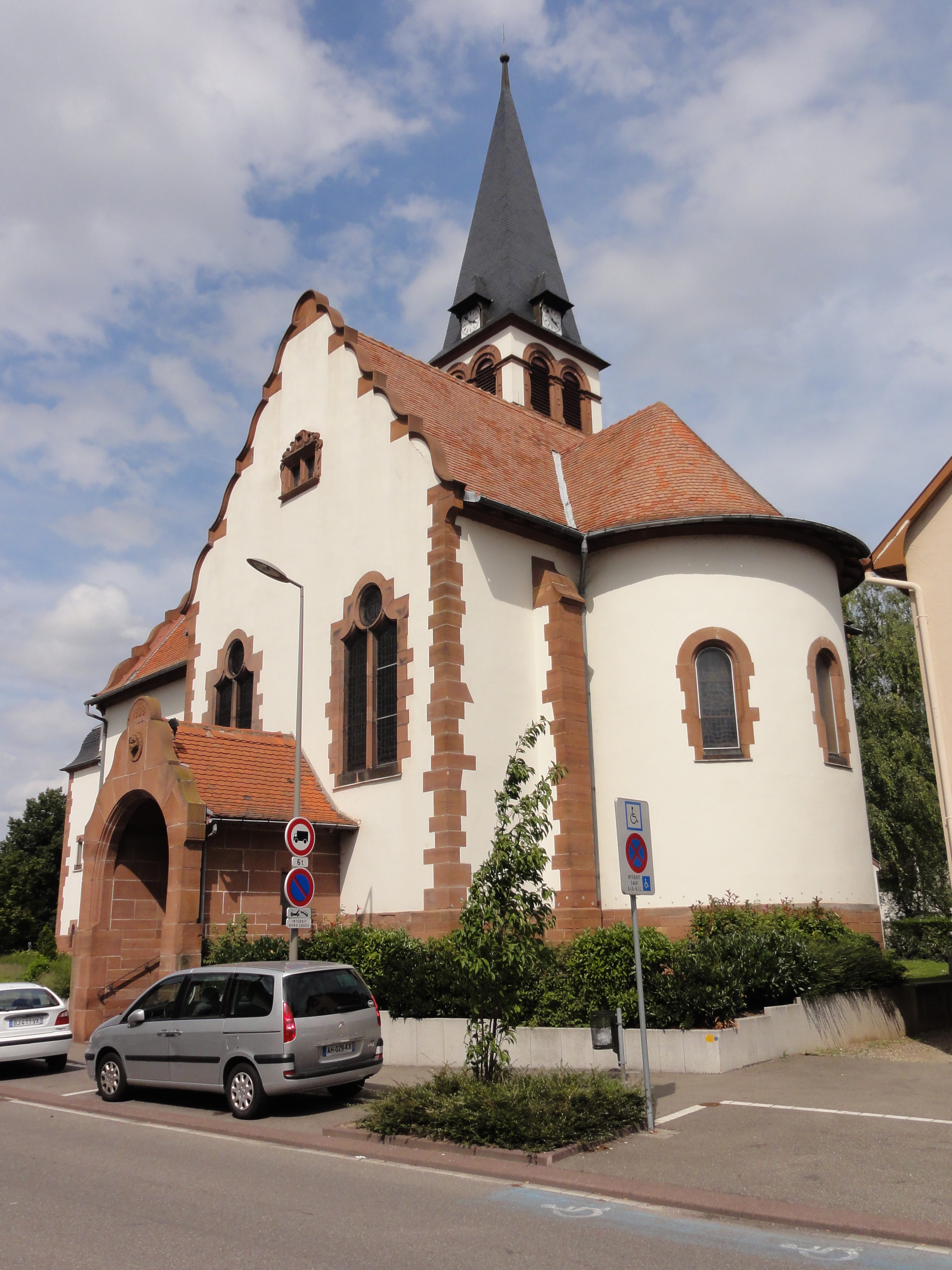 Alsace, Bas-Rhin, Église protestante de Lingolsheim, rue du Château (IA00024146).